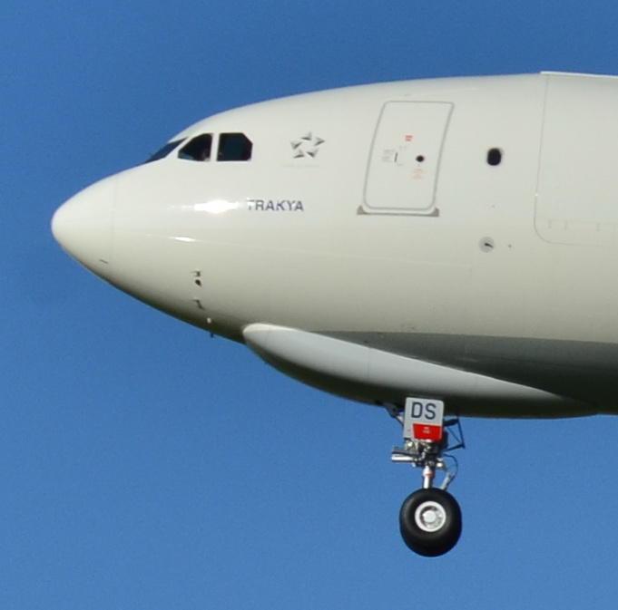 Photo prise à l'aéroport de Toulouse-Blagnac (LFBO) en France. Picture take at Toulouse-Blagnac Airport (LFBO) in France.